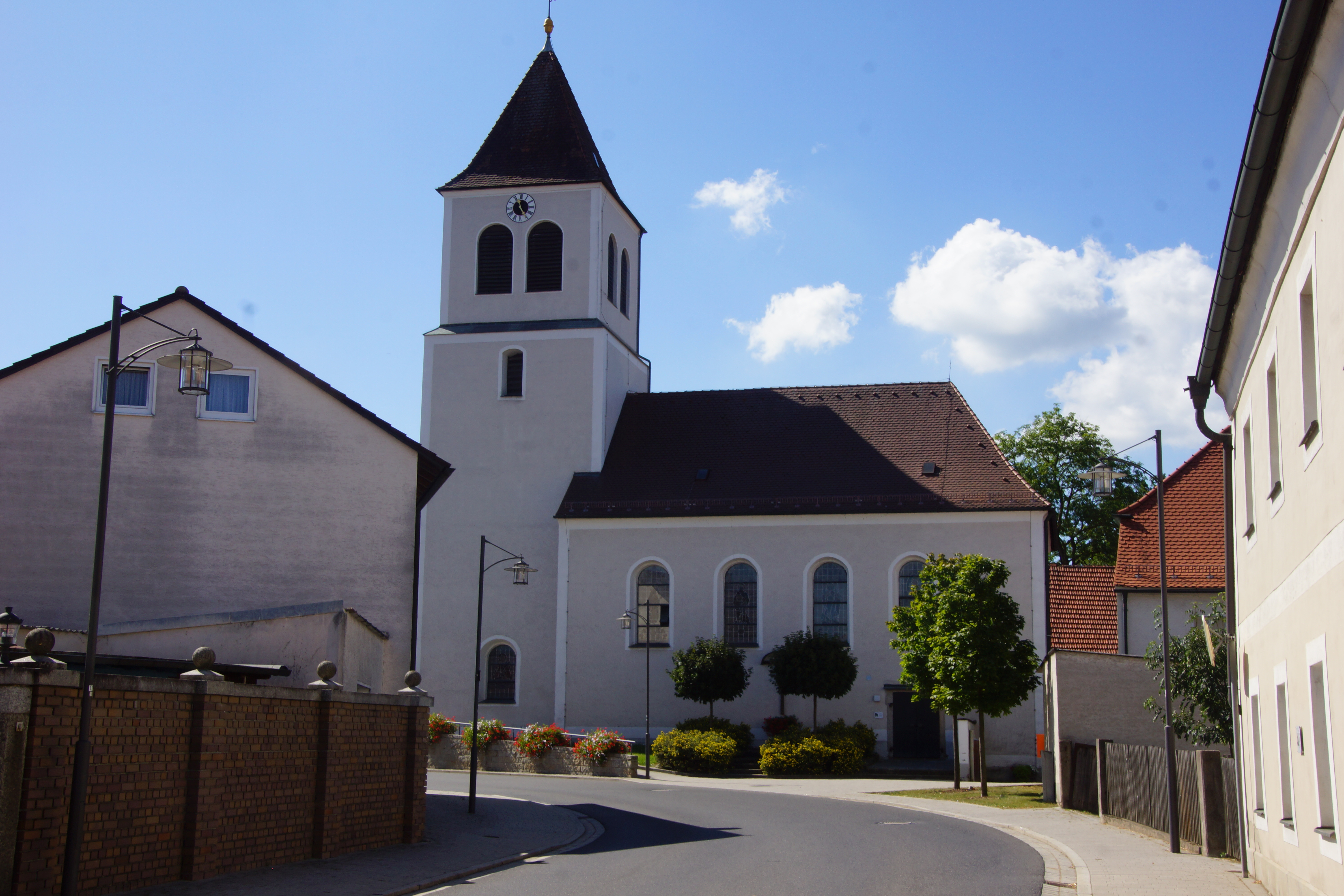 St. Jakob - Schirmitz